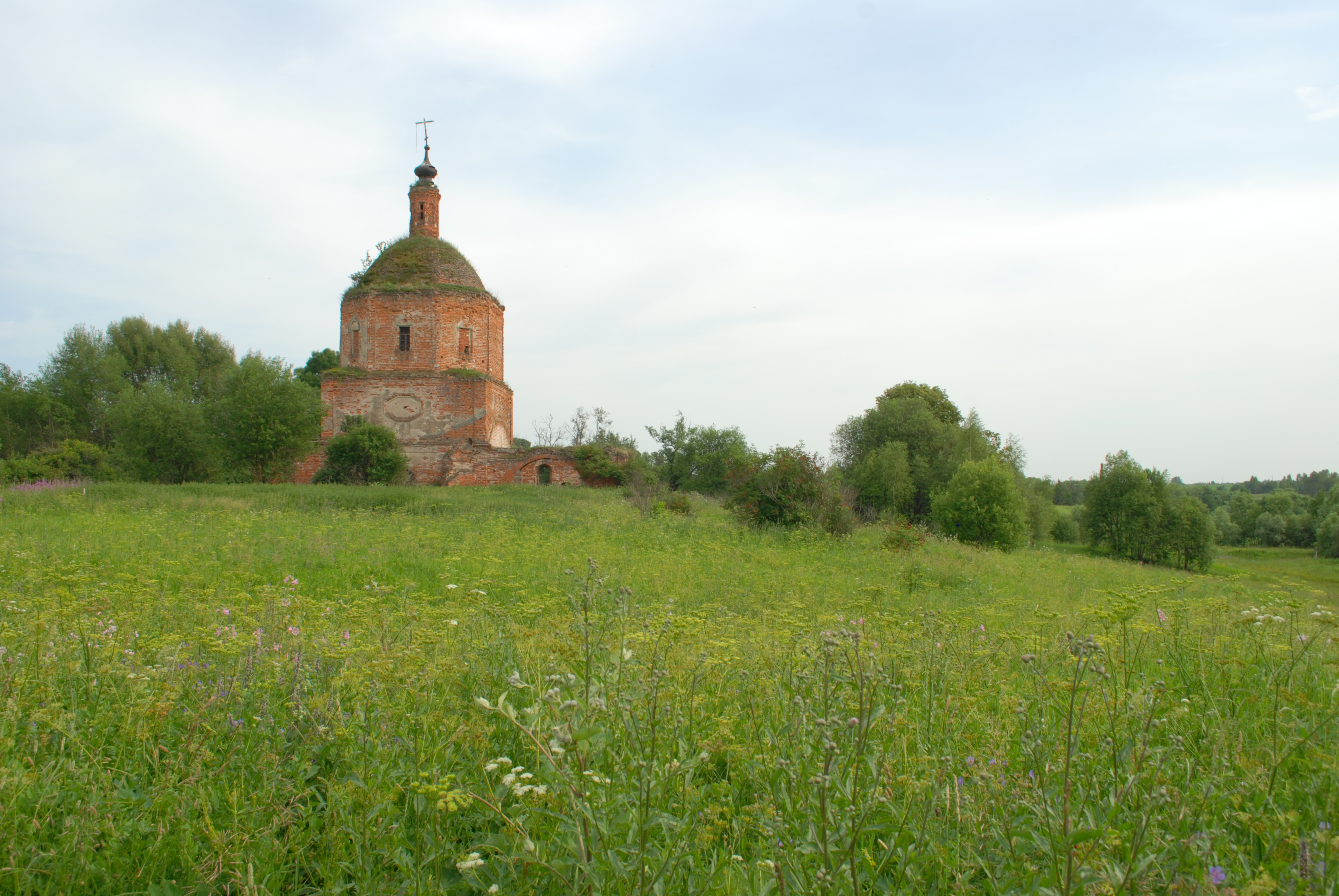 Церковь Никольская (Калужская область, Кондрово, село Гришово (Гришево))